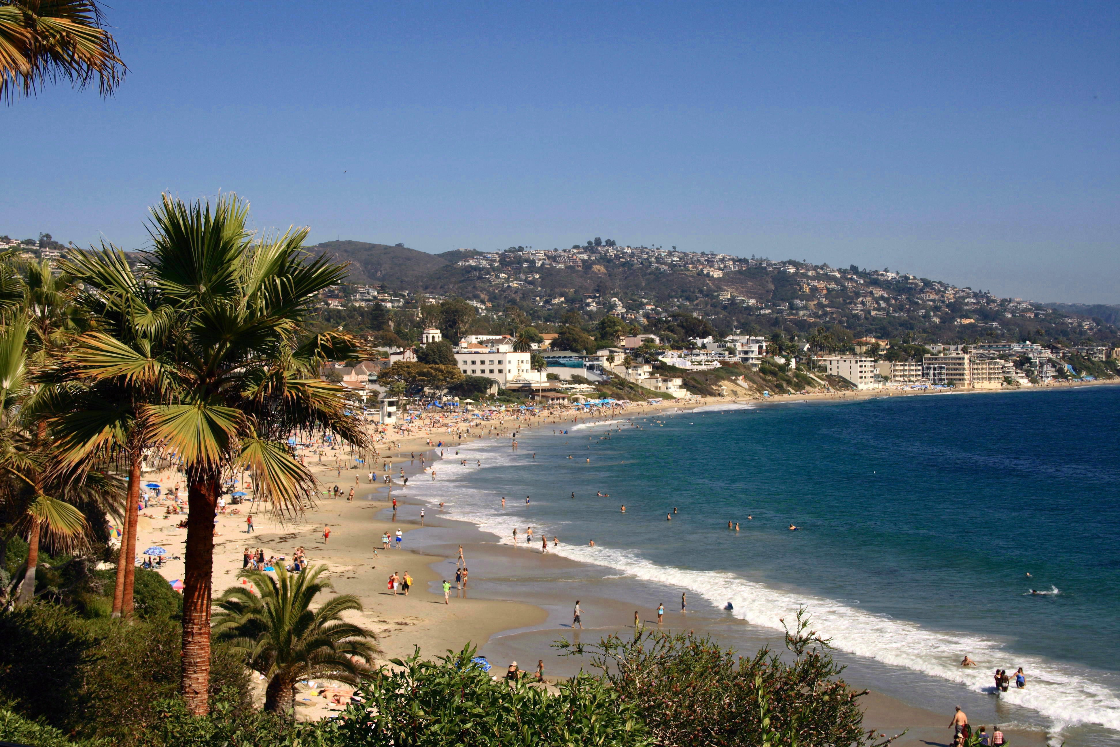 Blick auf den Strand von Laguna Beach